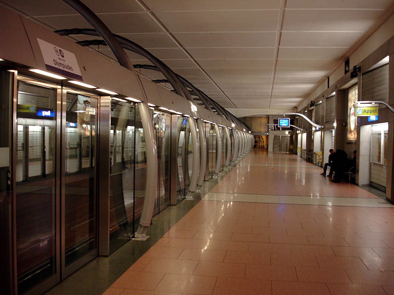 Station Bercy de la ligne 14 du métro de Paris, France.